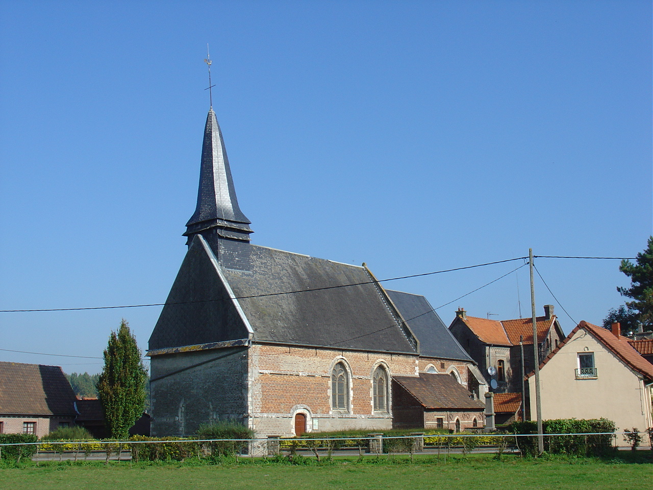 Église de Grigny